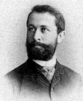 Retrat de Arthur Schoenflies (1853-1928), matemàtic alemany